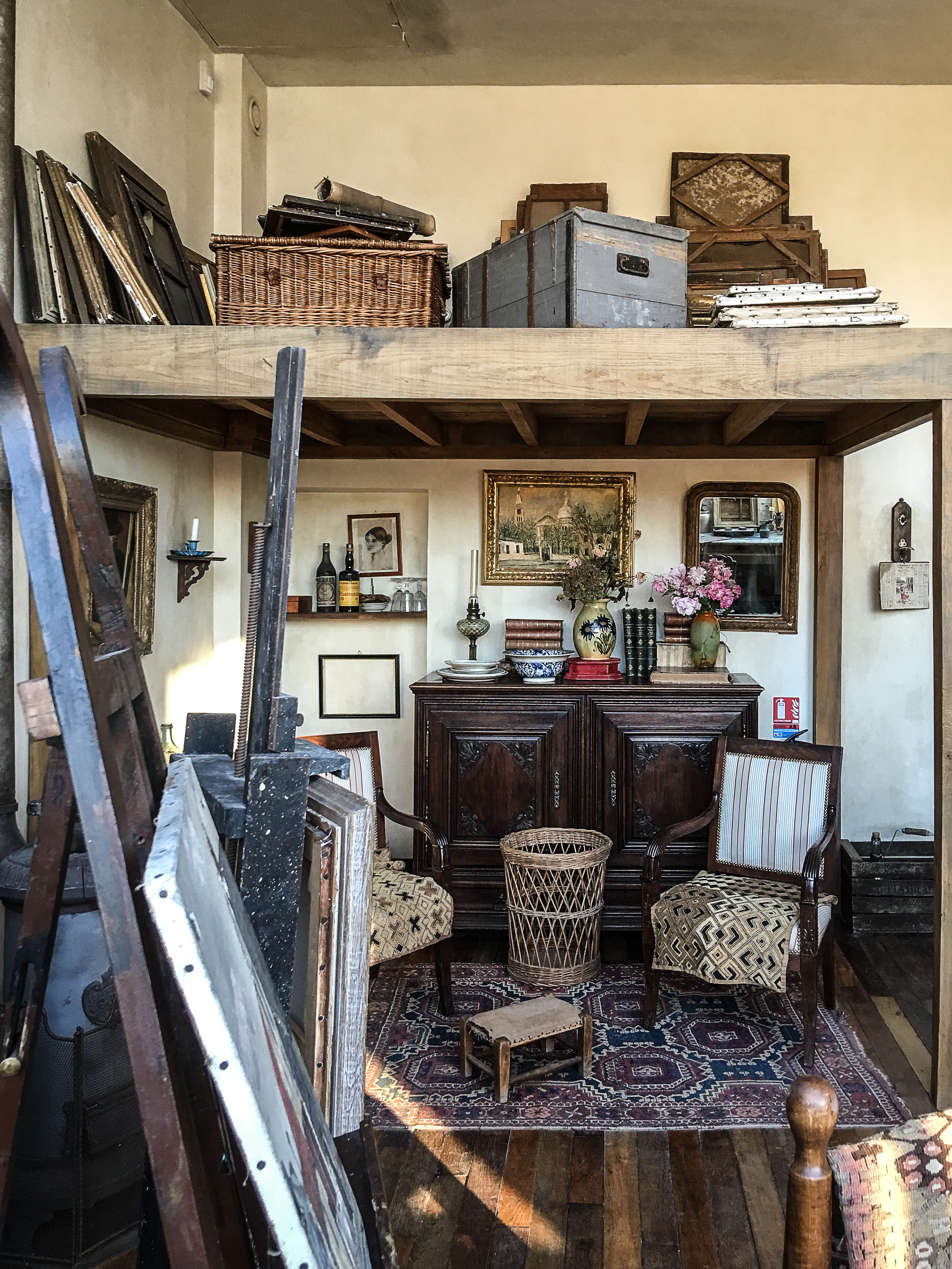 IMG_4367.jpg Suzanne Valadon, Maurice Utrillo, André Utter : 12, rue Cortot exhibition, 16 October 2015 - 15 February 2016, Musée de Montmartre, Paris.